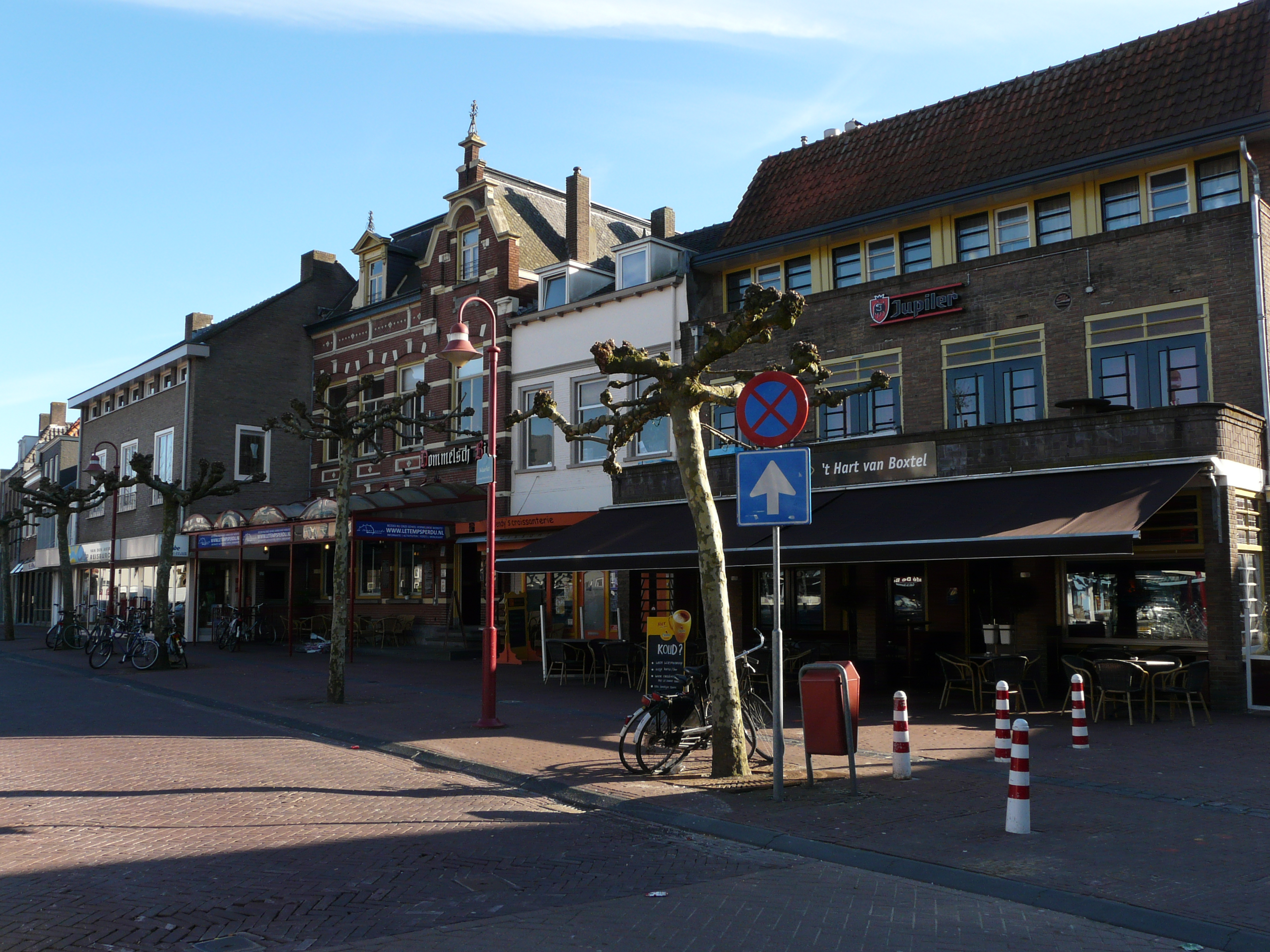 Straat in Boxtel